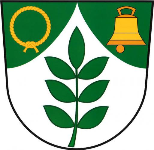 Staré Jesenčany znak